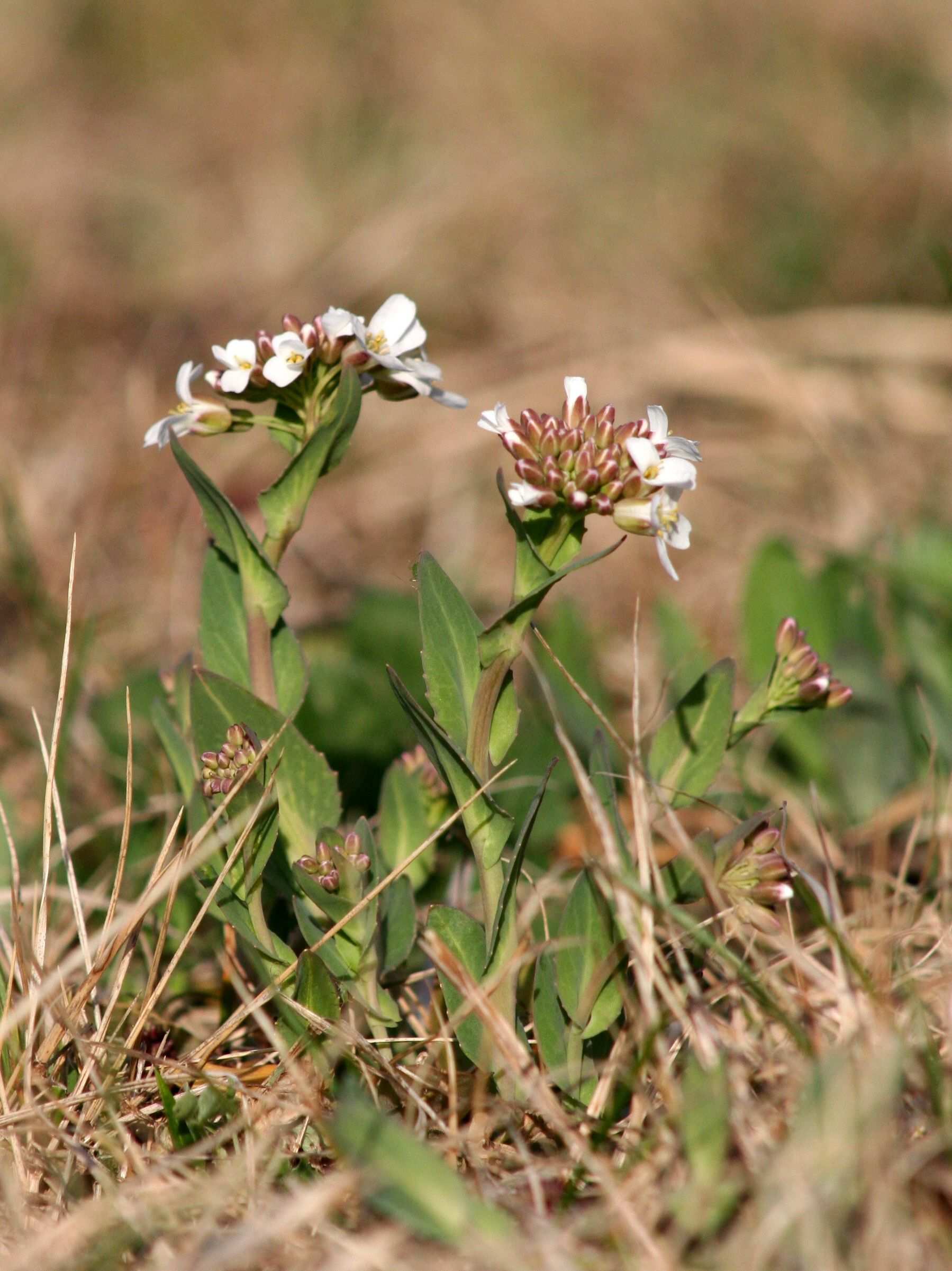 Erba storna montanina - Località : Pellegai, Mel (BL), 503 m s.l.m.